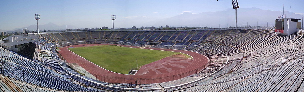 Vista panorámica del Estadio Nacional de Chile